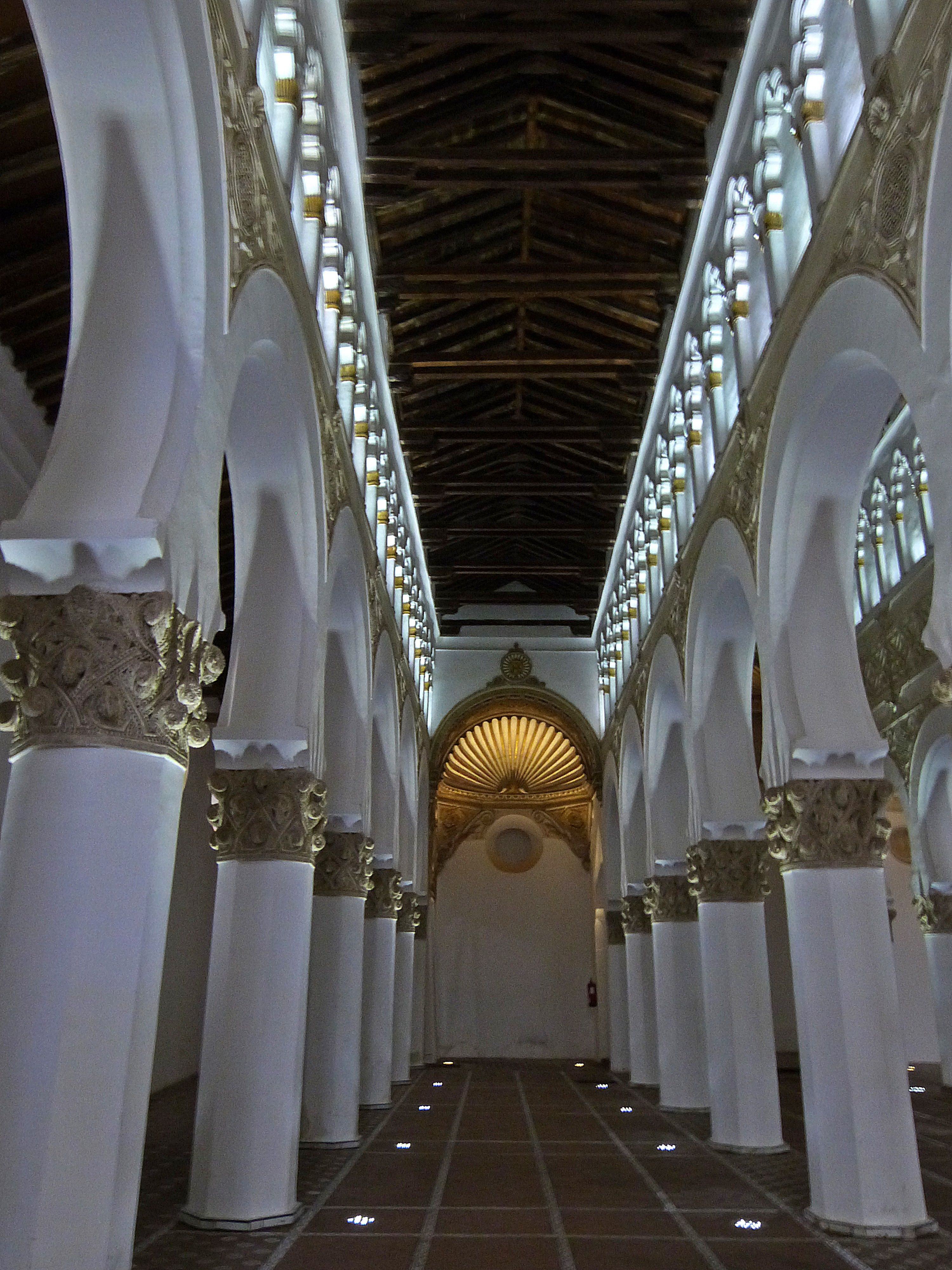 Synagoge Santa Maria Blanca, Toledo